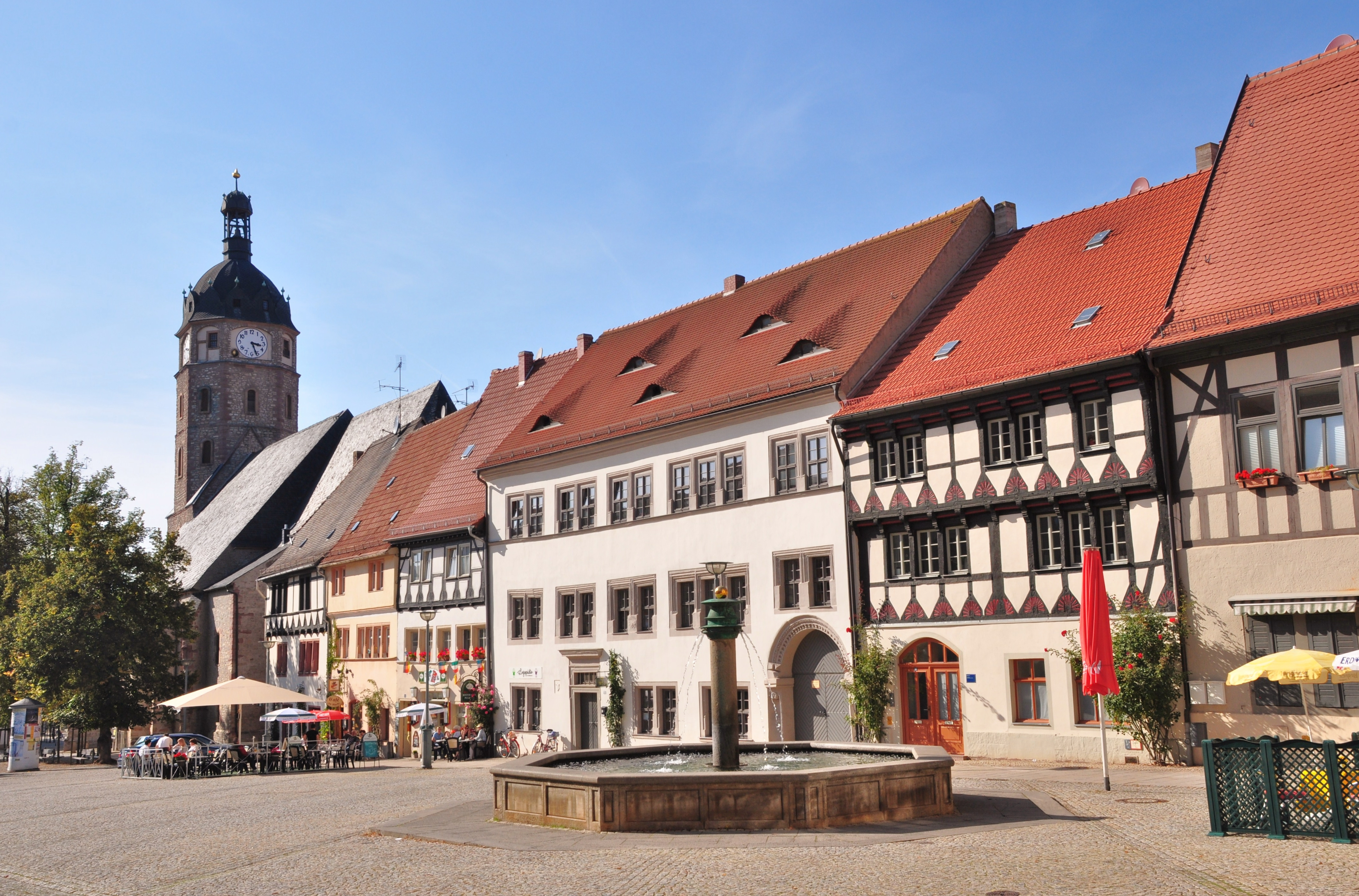 Рыночная площадь